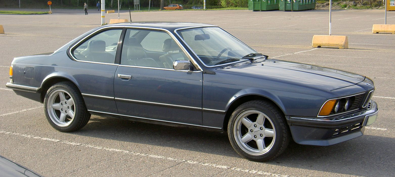 BMW 635 CSi 1982